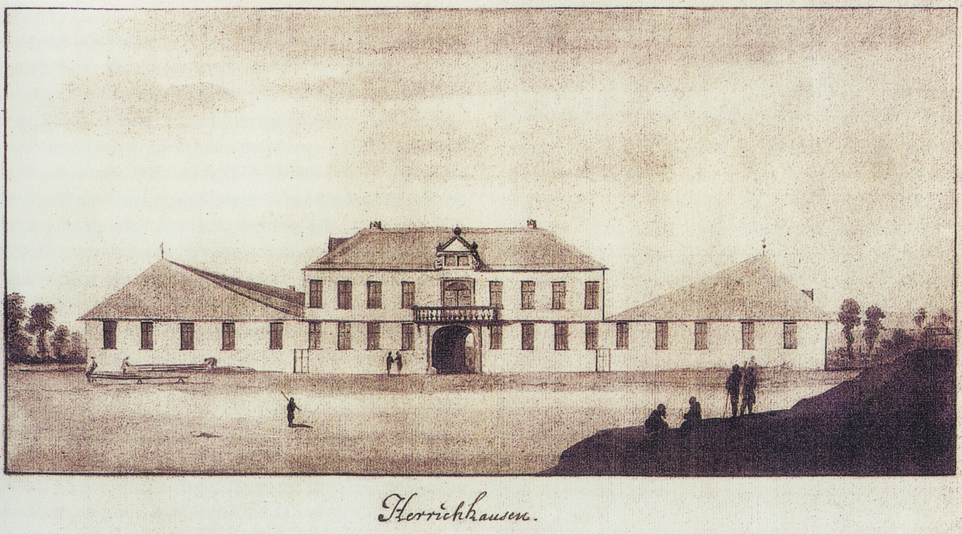 Johann Jacob Zeuner, Ansicht des Schloss Herrenhausenvon Norden, Zeichnung, um 1670.